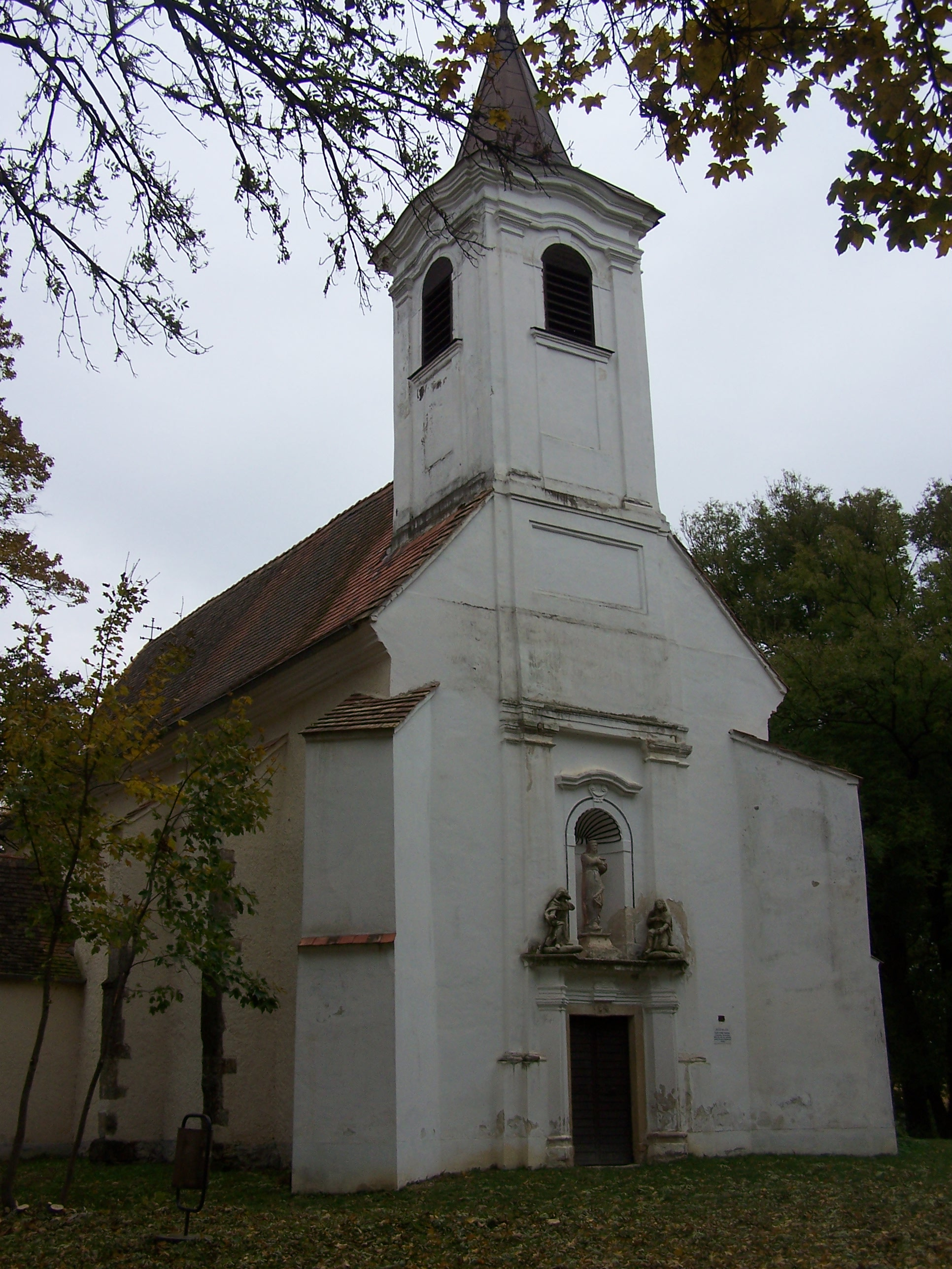 Szent István római katolikus templom (Nagyvázsony, Rákóczi u. 27.) This is a photo of a monument in Hungary, Identifier: 10082